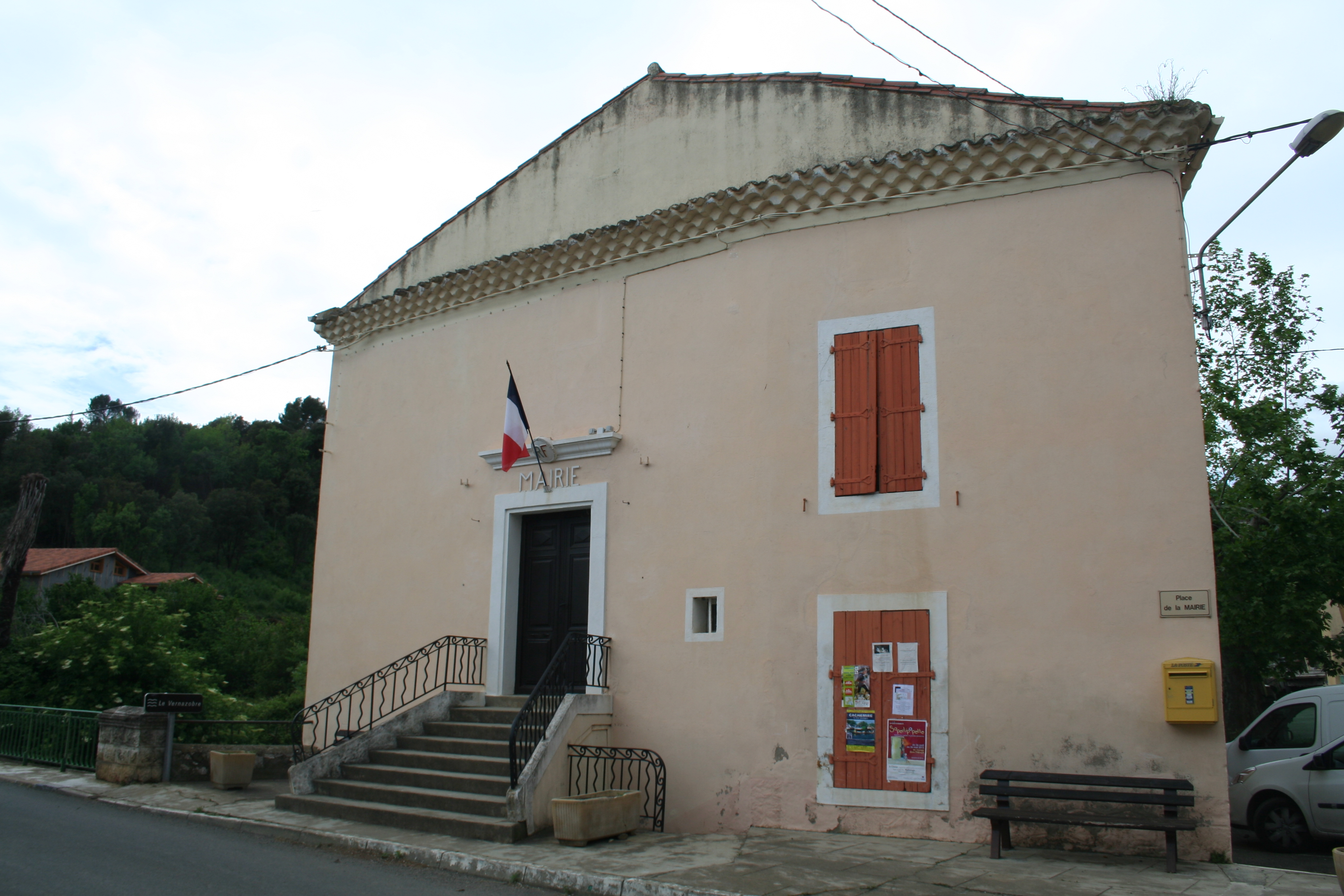 Babeau-Bouldoux (Hérault) - mairie.